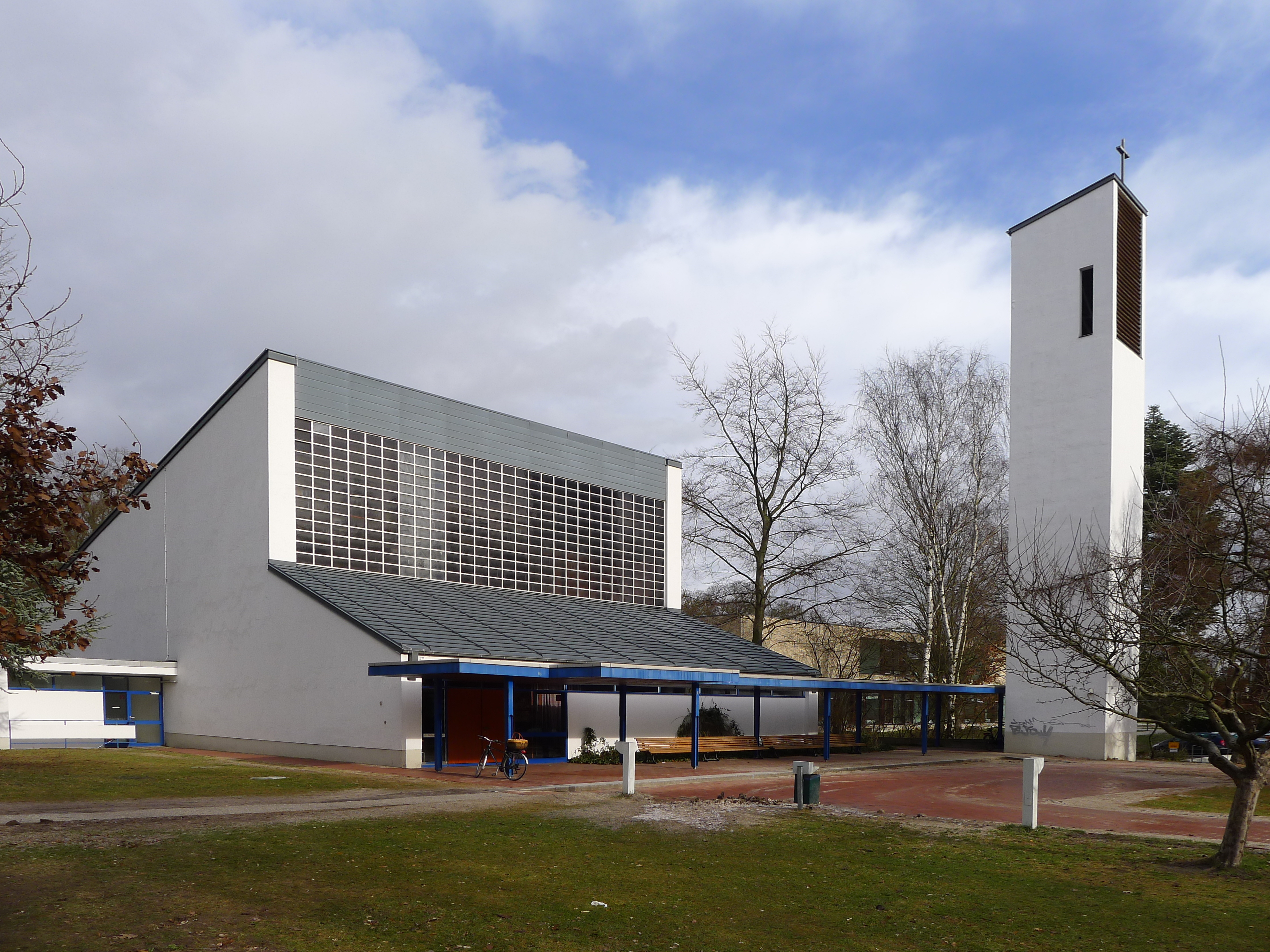 Blick auf die Kirche und den Campanile